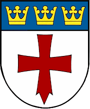 Wappen von Gondorf